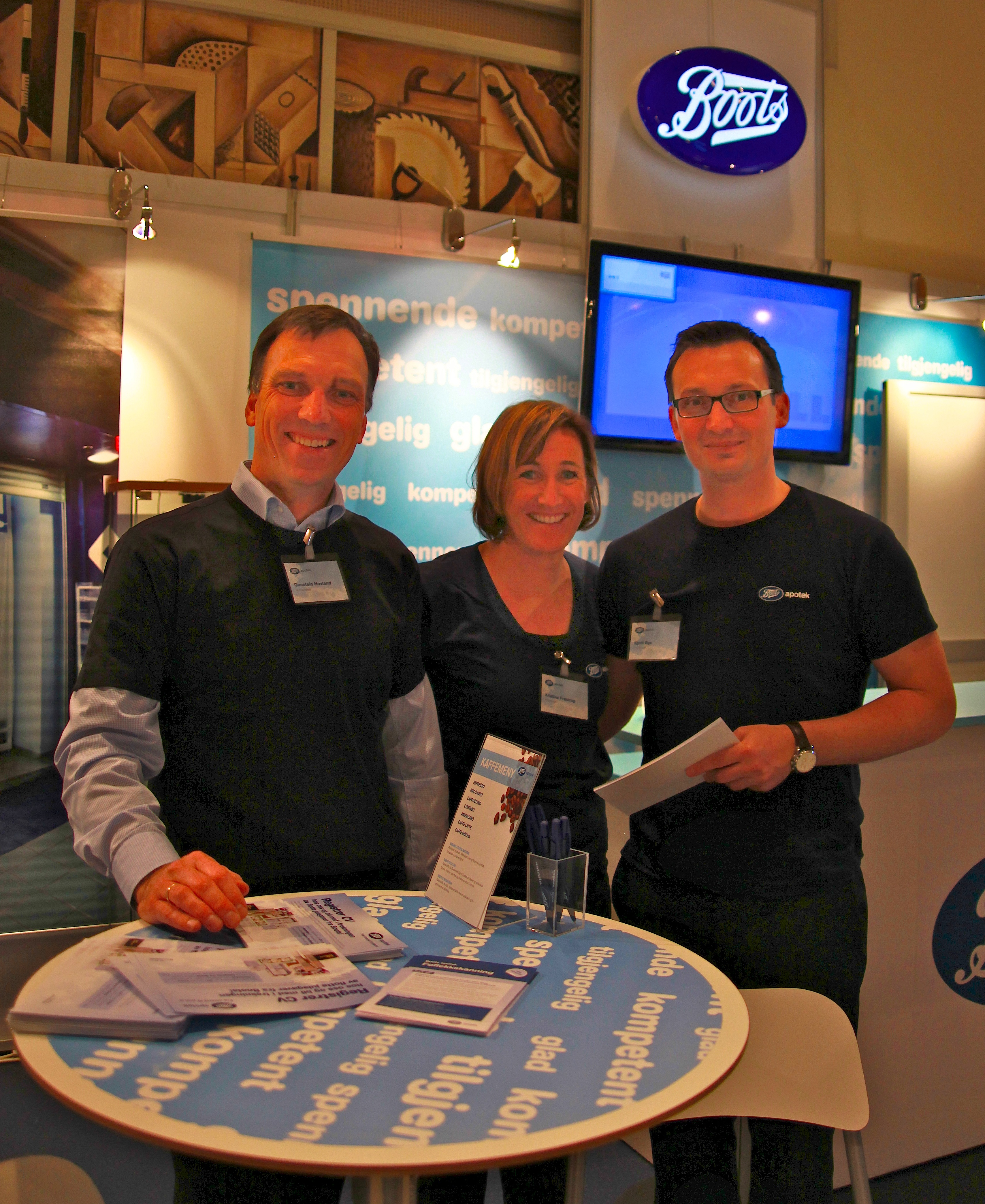 Alliance Boots Bildet brukt med tillatelse av de avbildede. From an exibition in Oslo 2011 with permission from Alliance Boots.